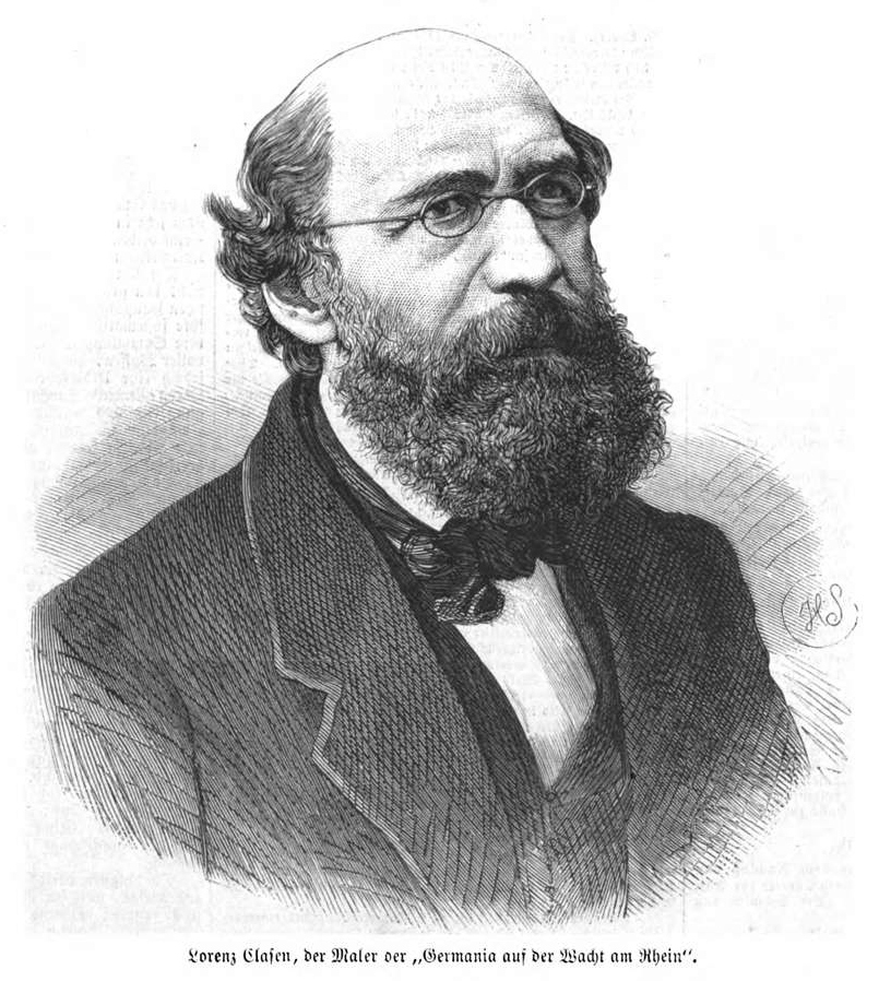 Lorenz Clasen, deutscher Maler im 19. Jh.